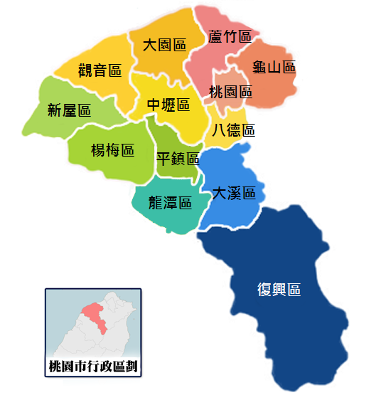 桃園市地方行政區劃